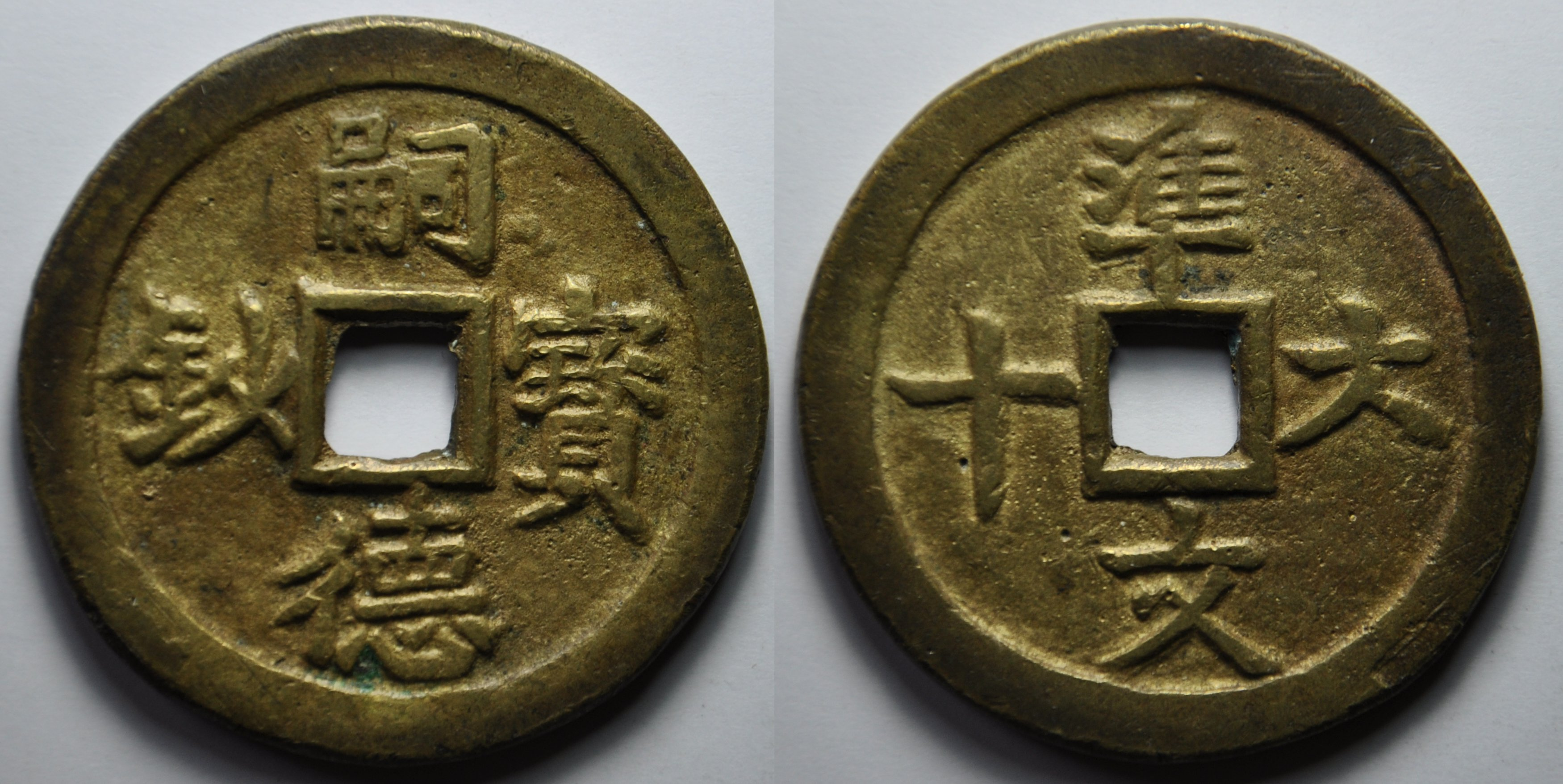 Une monnaie en laiton de 60 van de l'empereur Nguyen Phuc Thi (1847-1883), ère Tu Duc (1848-1883). A/ Tu Duc bao sao (Monnaie fiduciaire de Tu Duc) R/ Chuan luc thap van (Egal à 60 pièces) Poids : 31 g. Dimension : 47,44 mm Il y a eu deux émissions de ces pièces de monnaies fiduciaires : la première en 1861, avec les poids suivants (1.5, 3, 4.5, 6, 7.5 et 9 tien) (1 tien = 3,8 g.), la seconde en 1870 avec des poids plus légers. Cette monnaie est de l'émission de 1861. Son poids est de 8 tien au lieu de 9 tien. Le poids de ces émissions est irrégulier comme le prouve les monnaies conservées à la BNF. Référence : n°1726 du Catalogue des monnaies vietnamiennes par François Thierry, BNF, 1988